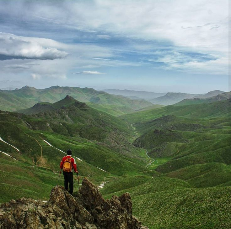 نمایی از قلعه شاه روستای لک بن